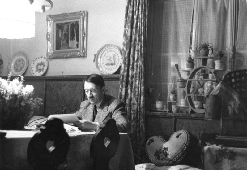 Abendliche Studien im Hause Wachenfeld